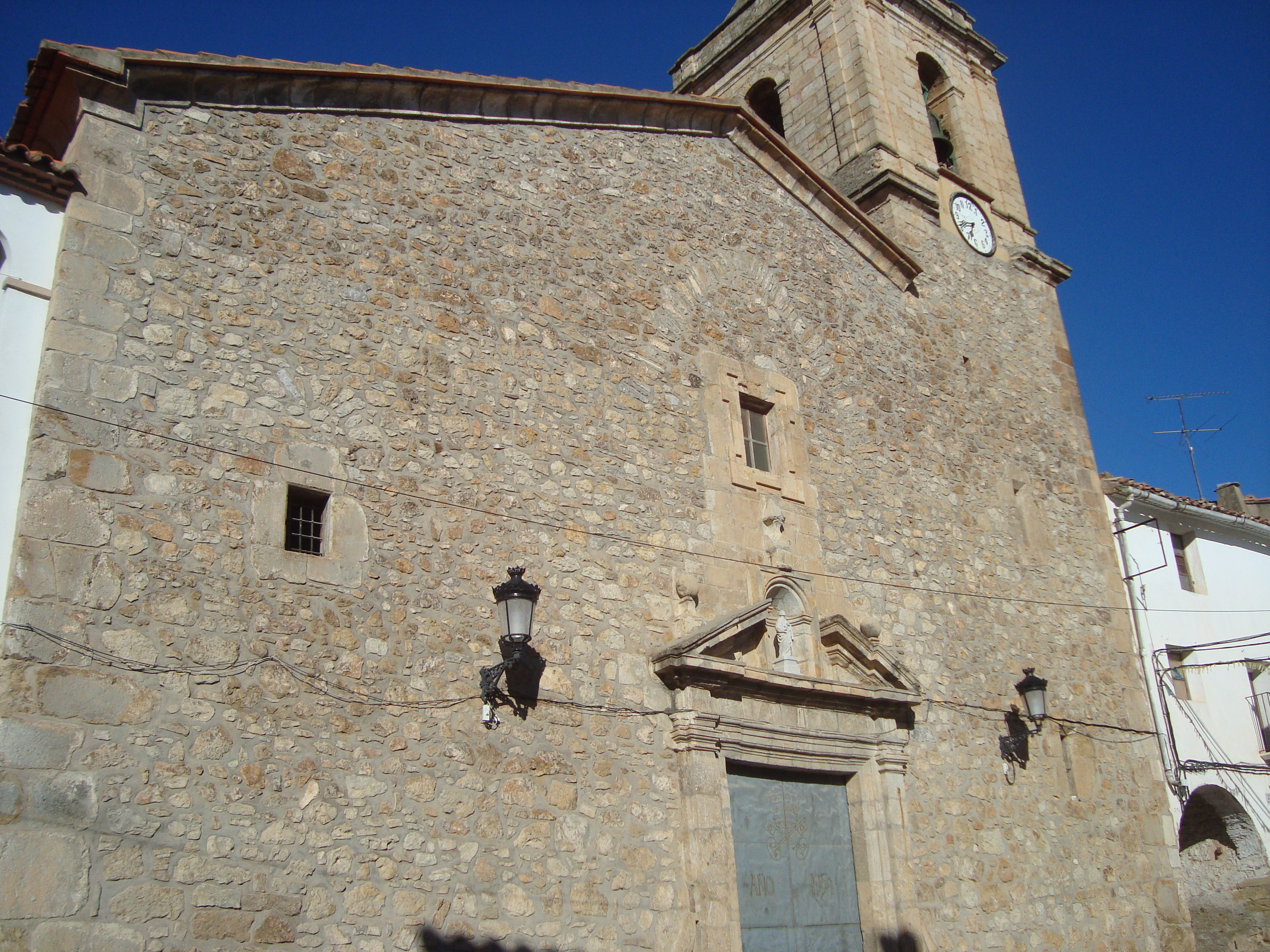 Església parroquial de Sant Pere (el Castell de Vilamalefa) 08.041-002.